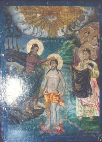 Γεώργιος Αθανασίου, Βάπτιση του Χριστού, 1876, Συλλογή Ιεράς Μητρόπολης Θεσσαλονίκης